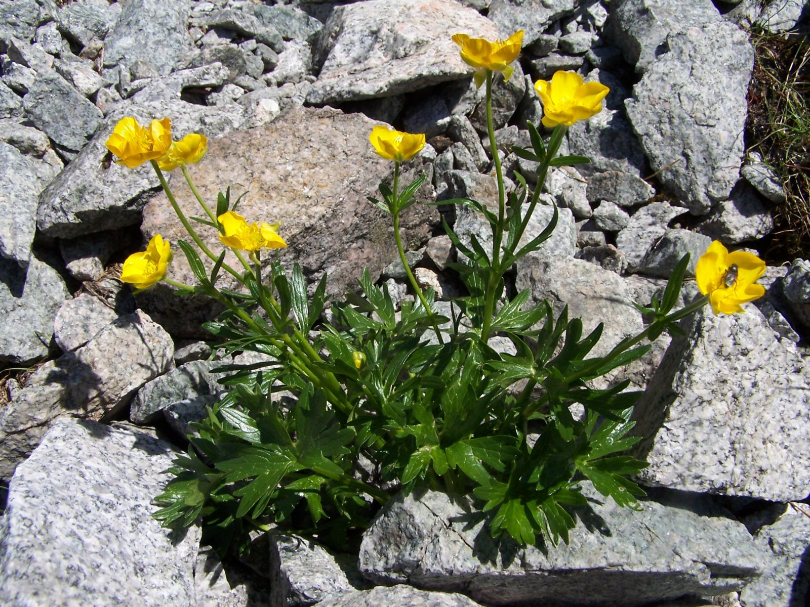 Ranunculus pseudomontanus (pl. jaskier halny), habitat: Tatra Mountains, Orla Perć, Kozi Wierch